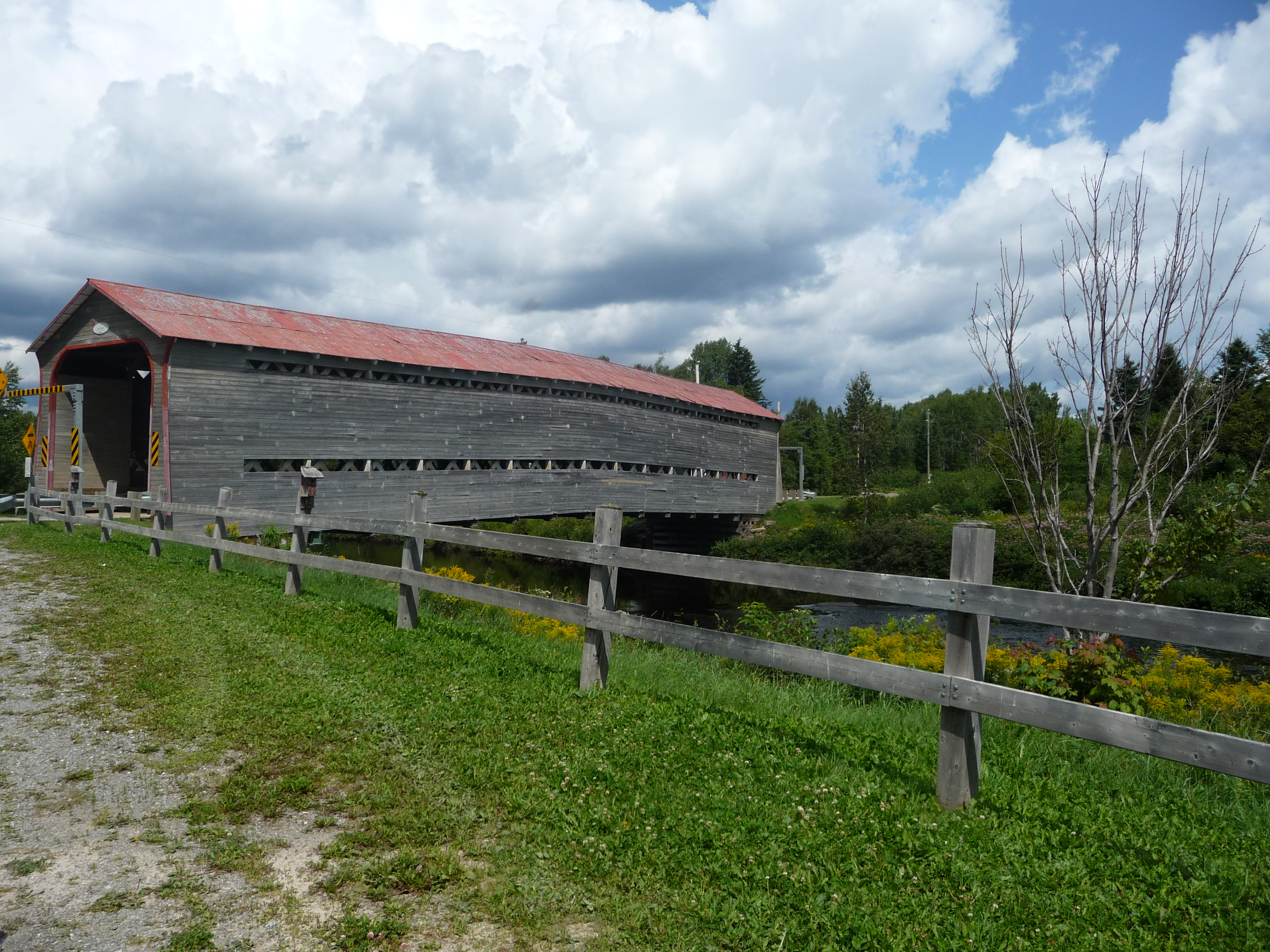 Pont couvert Du Sault traversant la rivière Noire, Saint-Adalbert, Québec